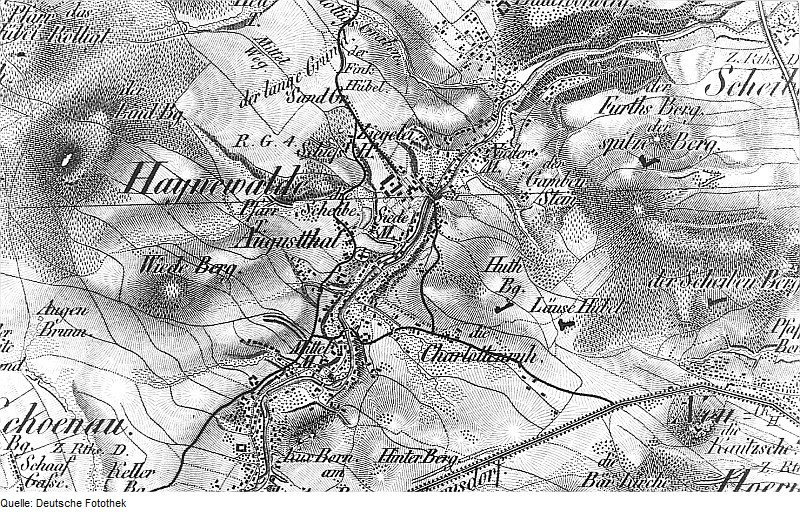 Original image description from the Deutsche Fotothek Hainewalde. Oberreit, Sect. Zittau, 1844/46